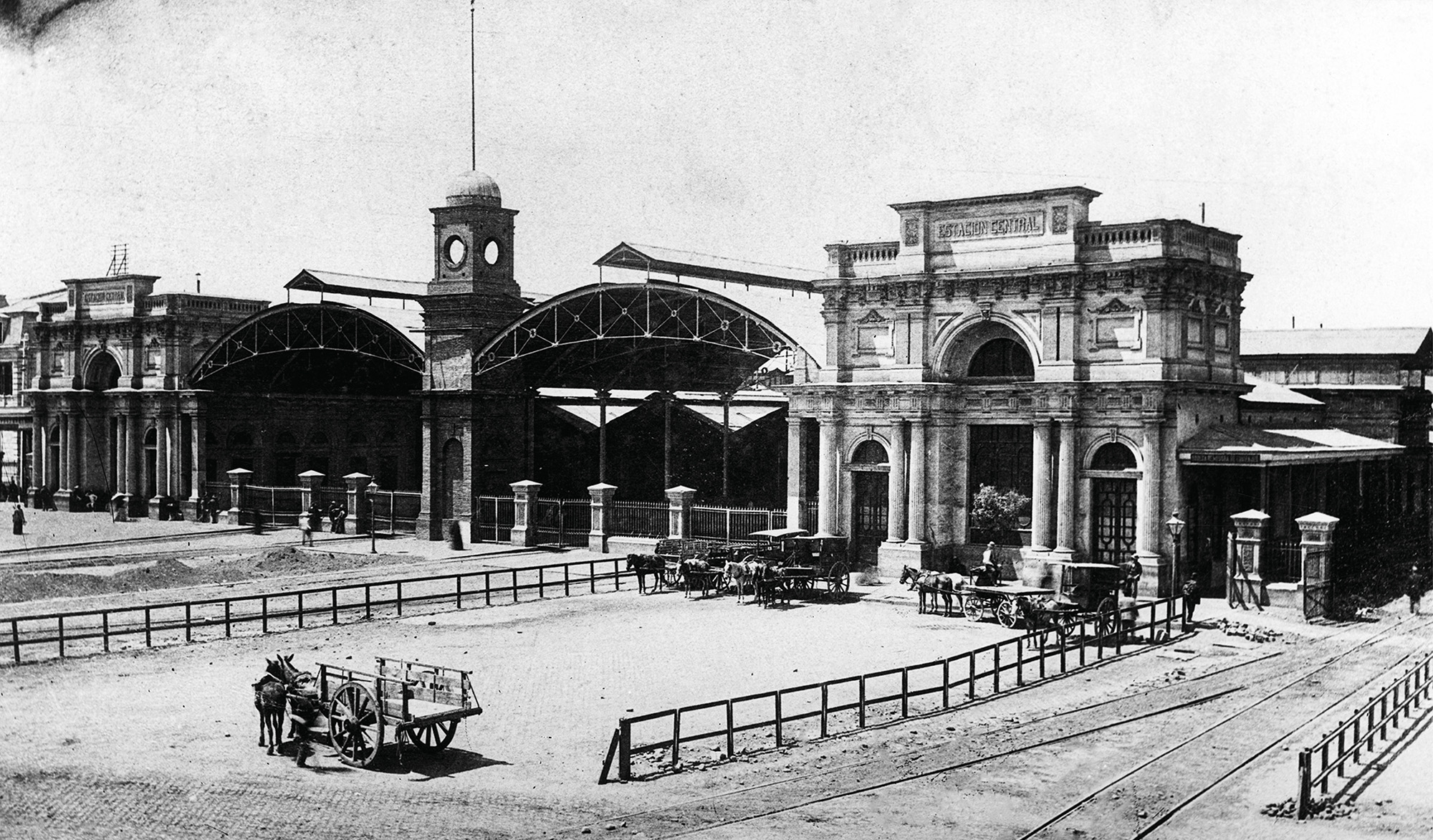 Antigua Estación Central, ubicada en la parte poniente del paseo Alameda de las Delicias, antes de que se le construyera la actual cúpula de dos aguas que le da el aspecto imponente actual y que constituye uno de los hitos arquitectónicos de la Avenida Bernardo OHìggins, principal arteria de la capital chilena. De esta estación salen los trenes que se dirigen al sur del país.